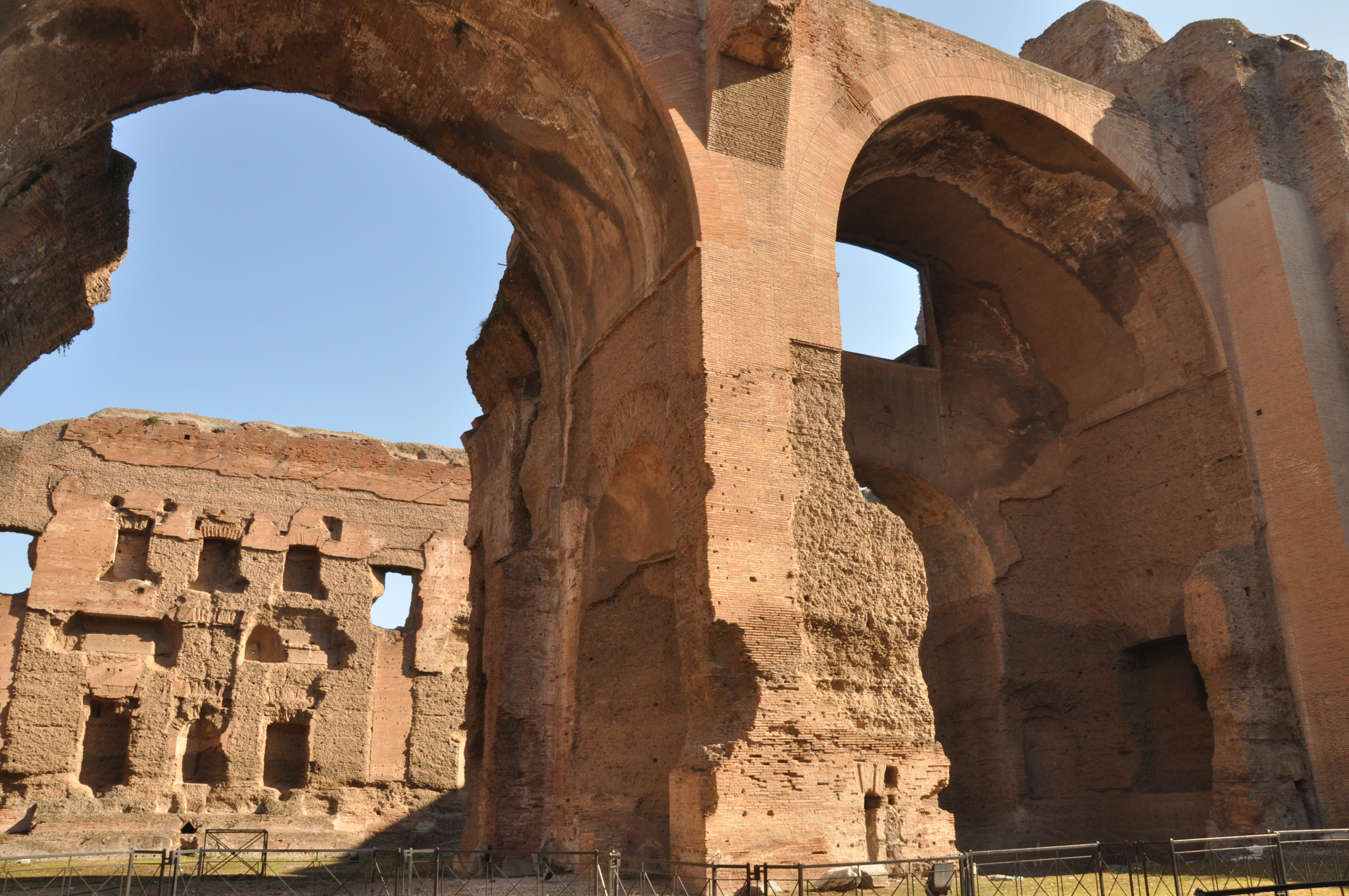 Terme di Caracalla